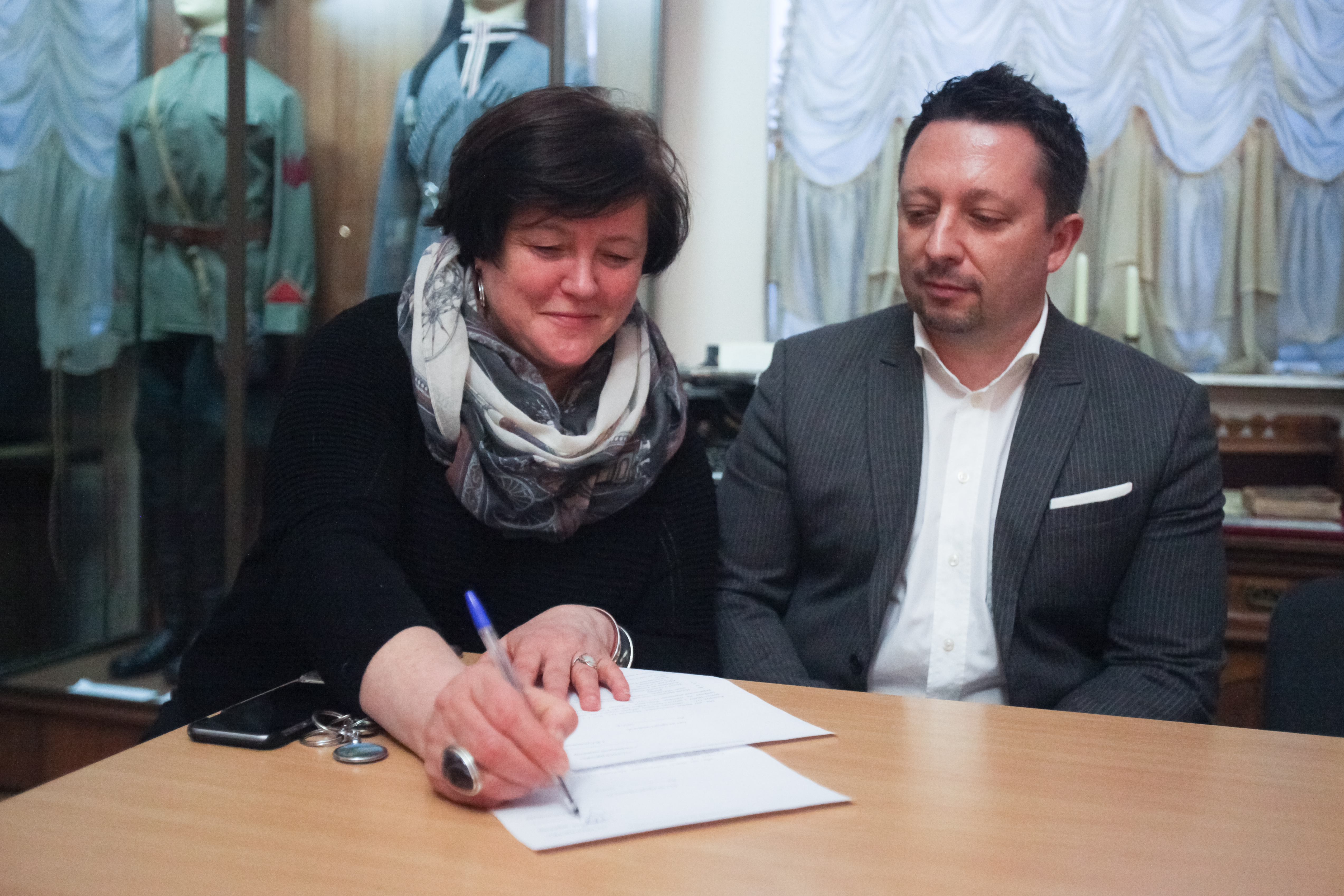 Передача капсули з землею з могили Євгена Коновальця до відділу «Музей Української революції 1917-1921 років» Національного музею історії України. На фото колекціонер Олександр Мураєв, який передав капсулу та генеральний директор НМІУ Тетяна Сосновська.